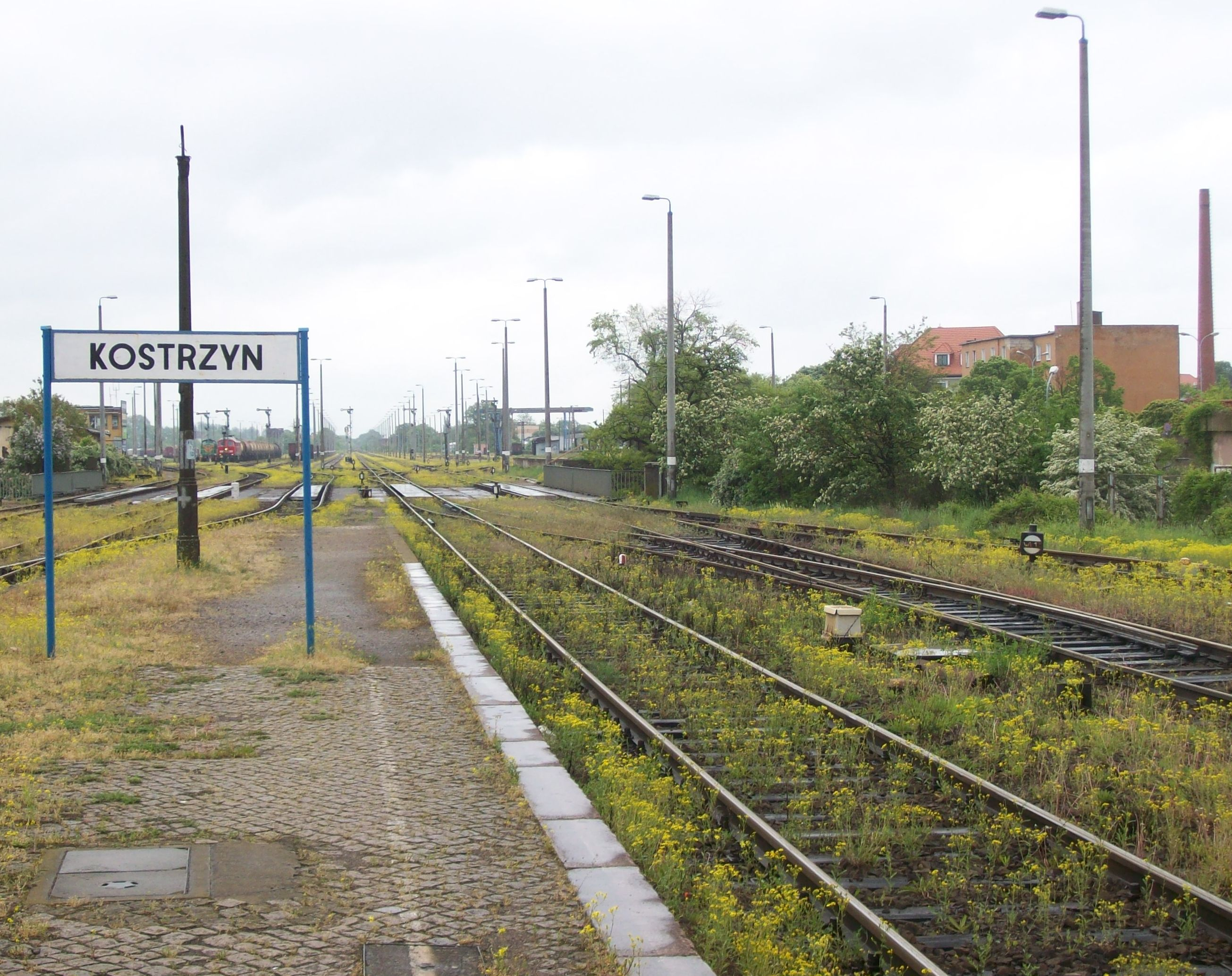 Linia kolejowa nr 203 (szlak Kostrzyn - Dąbroszyn) - widok z peronów stacji Kostrzyn.